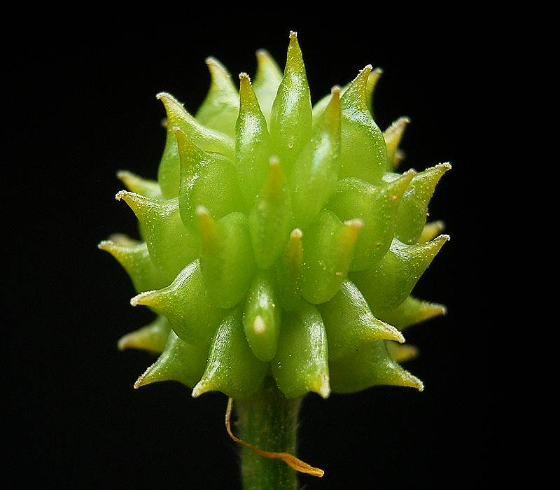 Ranunculus repens